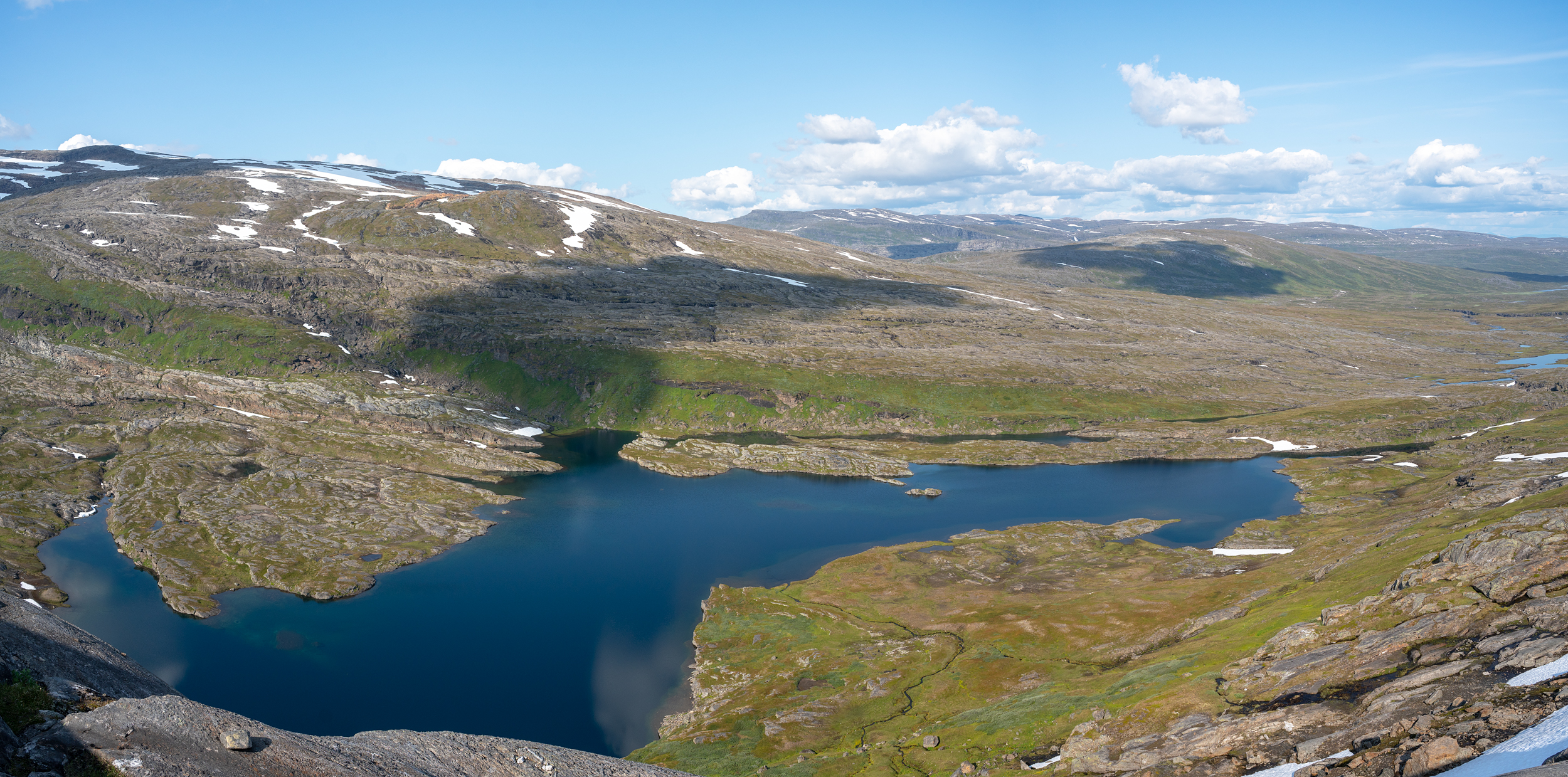 Guovddelisjávrásj - vy mot nordost från Snötoppen.